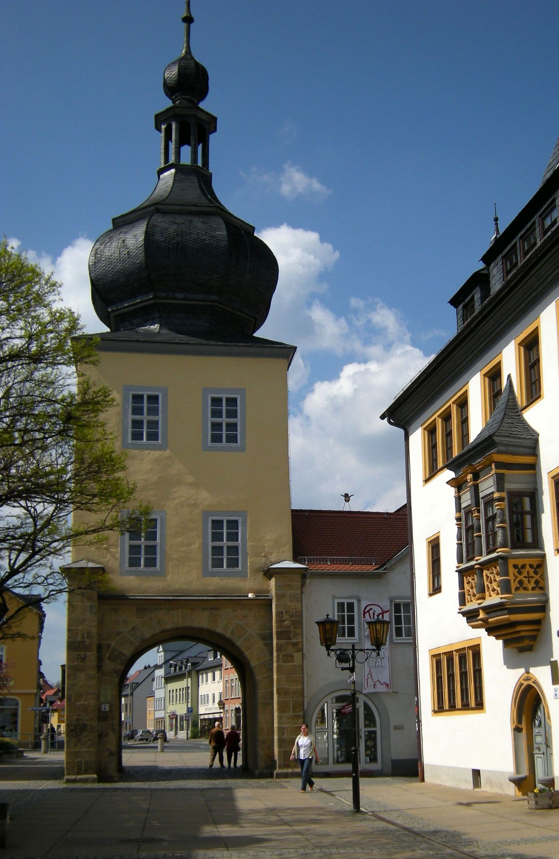 Saalfeld - Blankenburger Tor.jpg